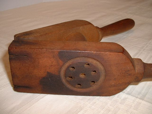 alte Zitruspresse